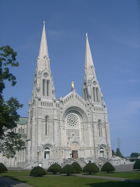 Basilica Ste Anne de Beaupré, Québec Ste Anne de Beaupré, Québec